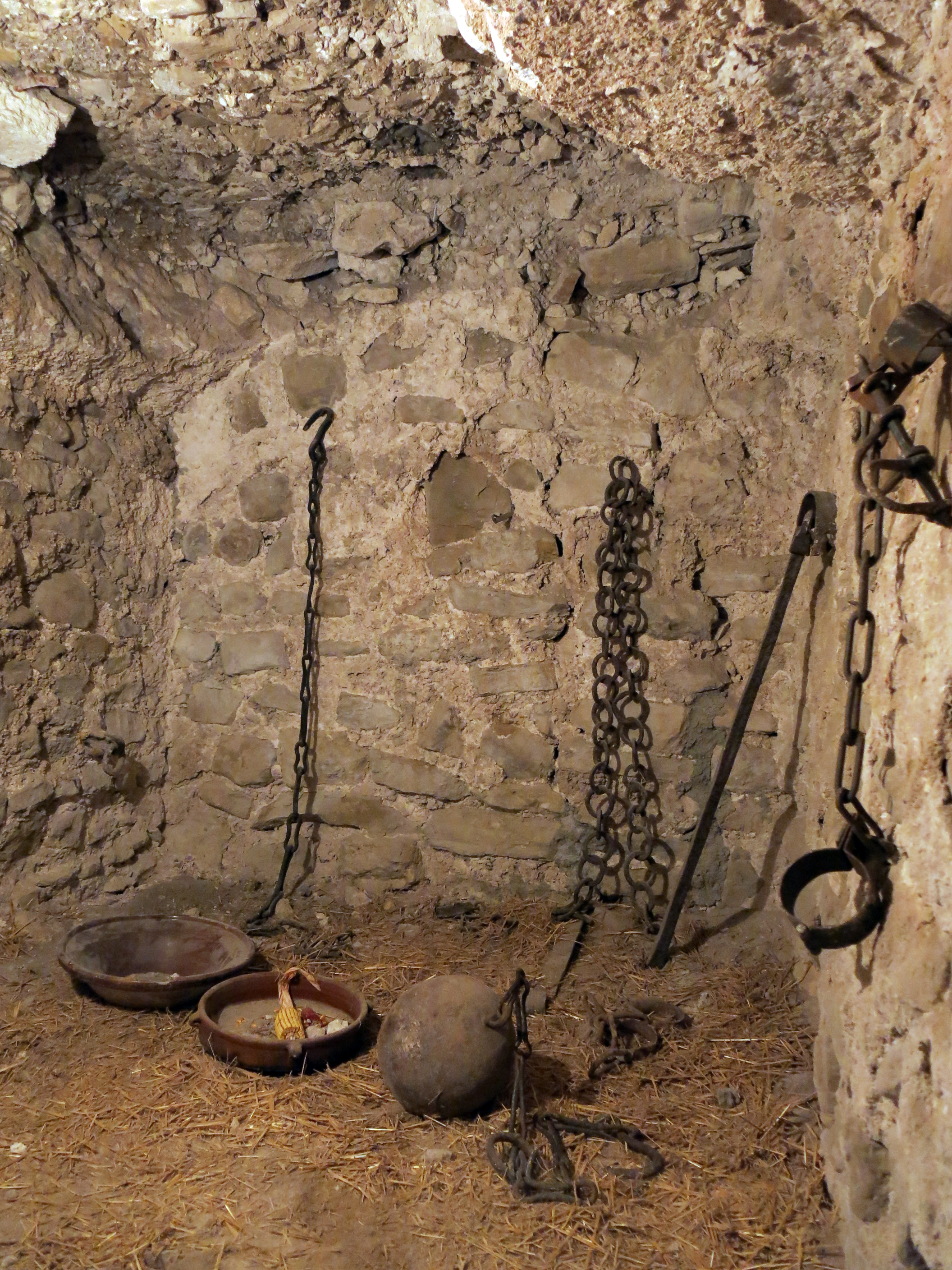 Castell de Montsonís